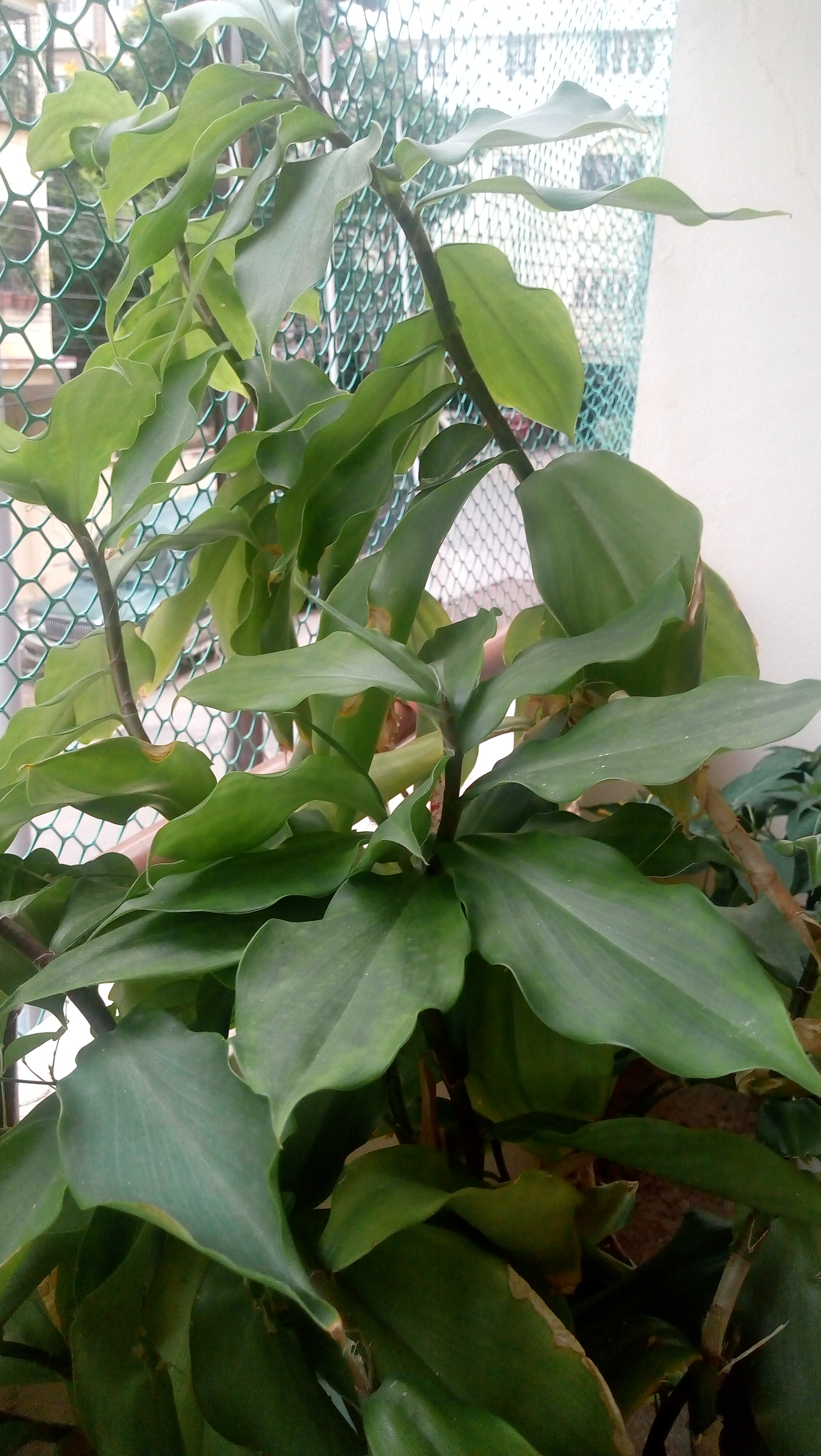 ఇన్సులిన్ మొక్క